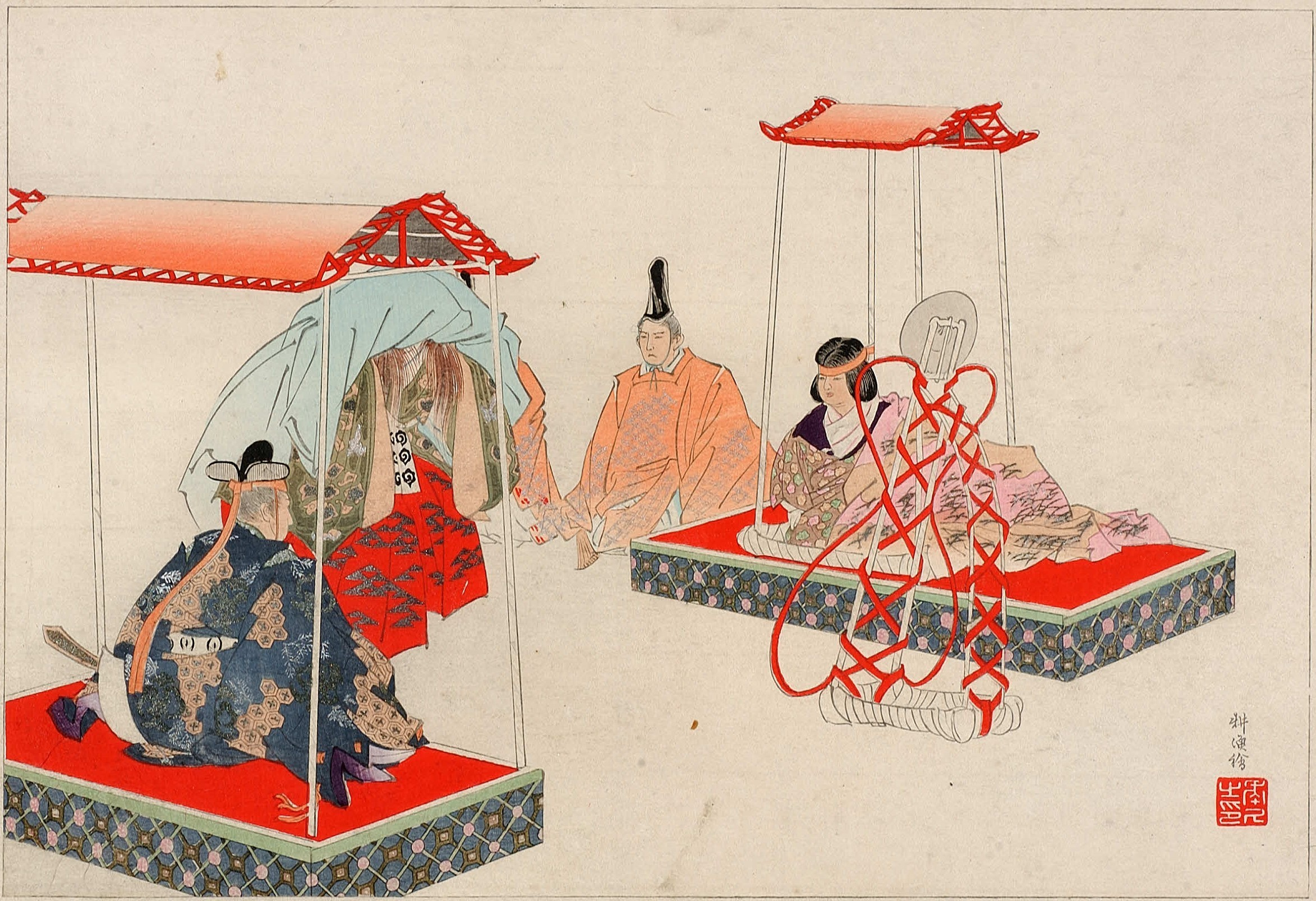 Scene form Nô-play "Kôtei"